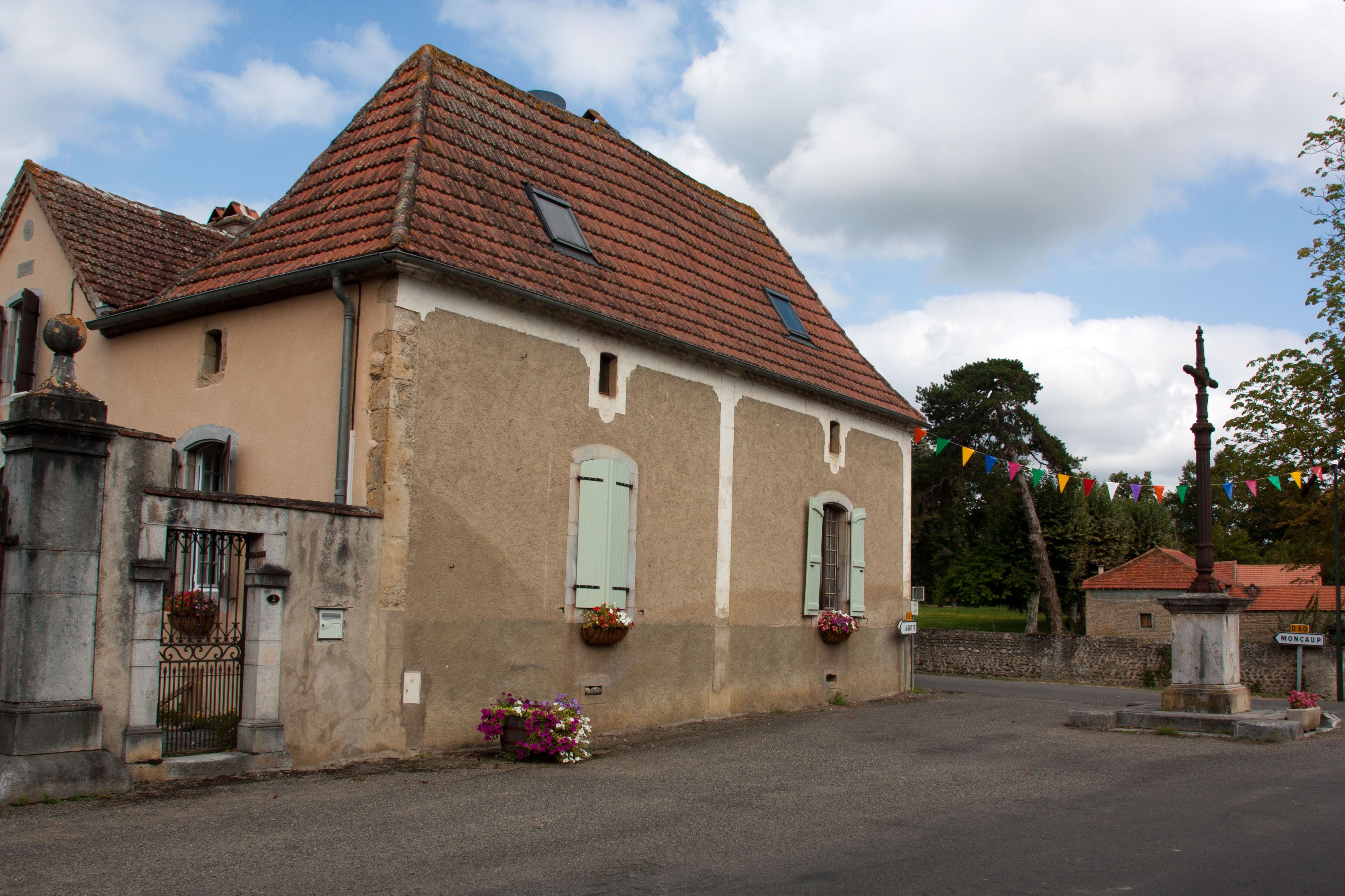 vues de Sombrun, Sombrun, Hautes-Pyrénées, France